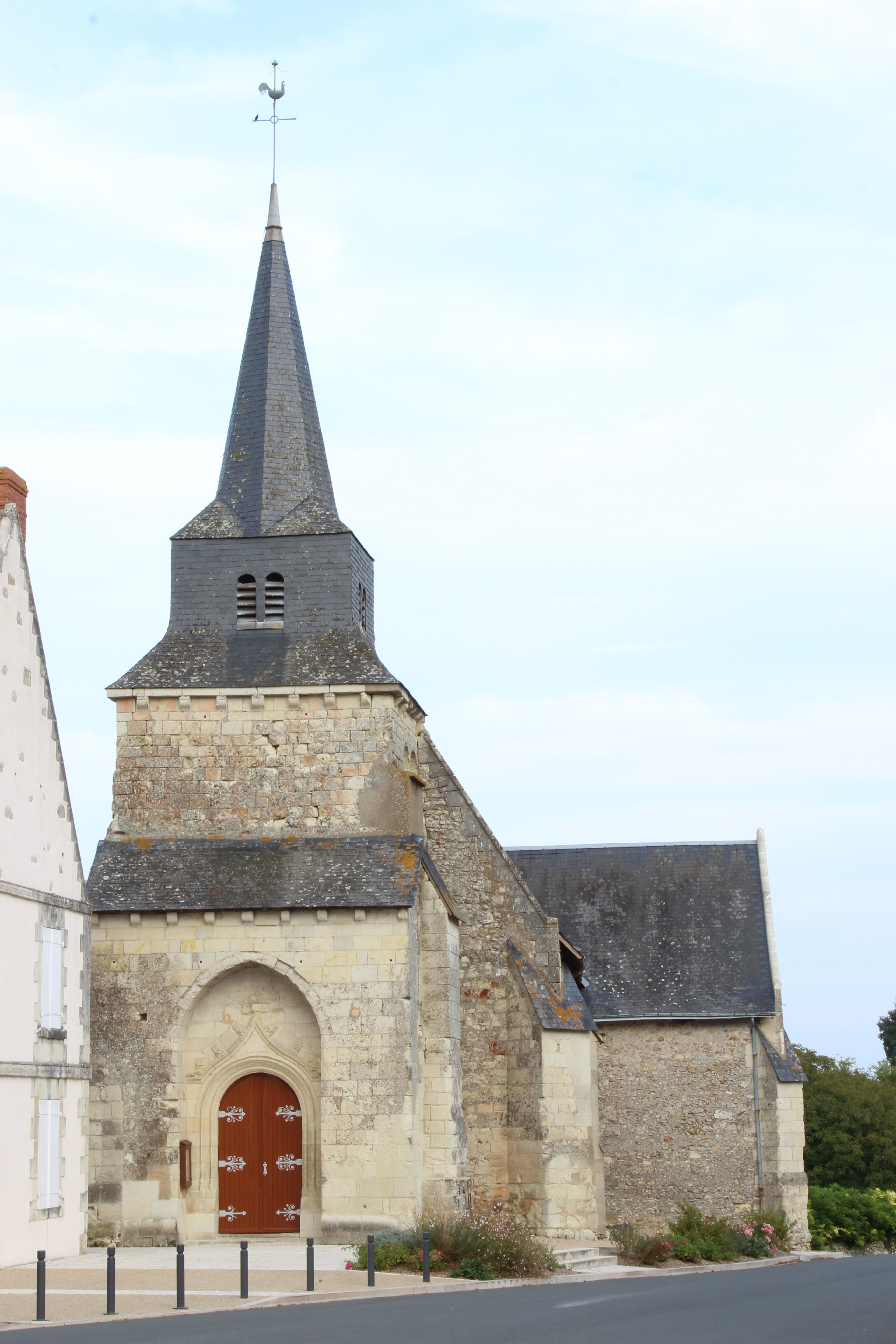 Église Saint-Rémi de Leigné-les-Bois